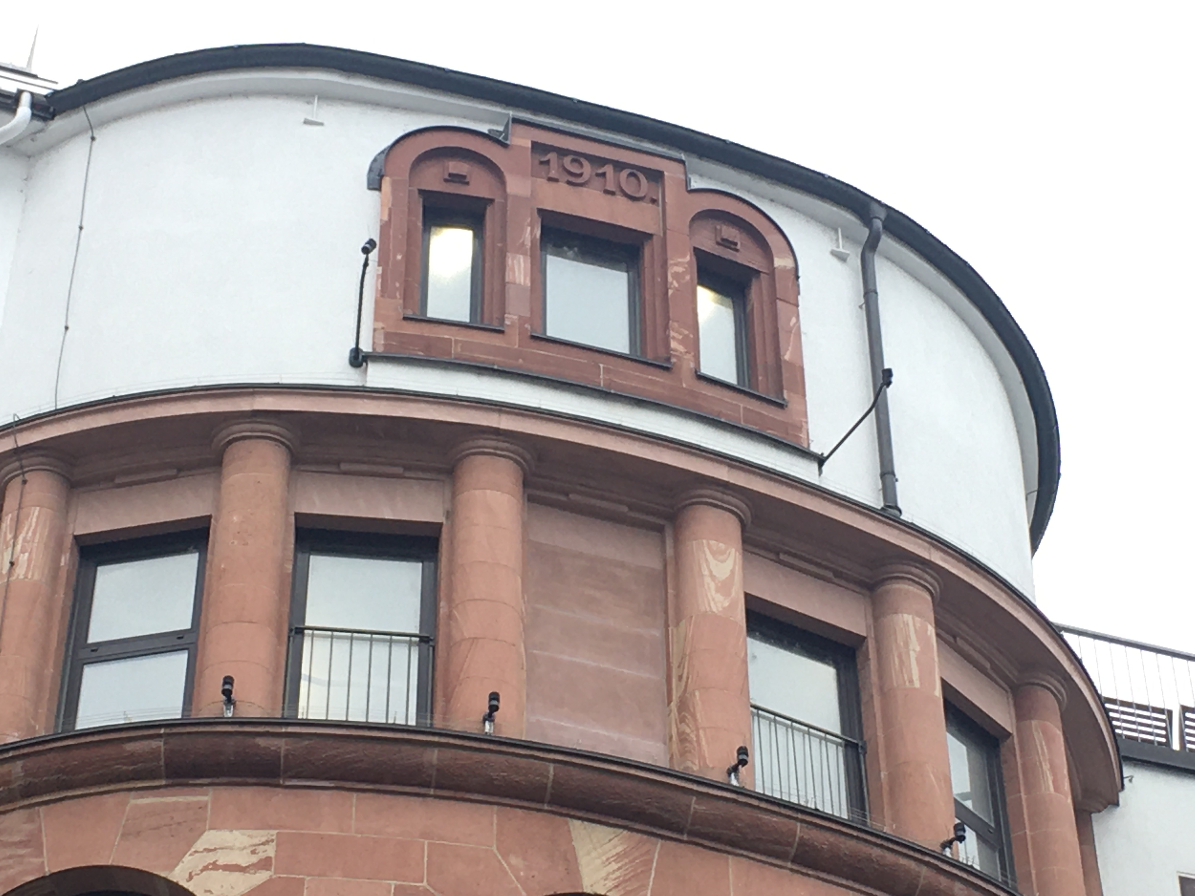 Holzgraben Frankfurt